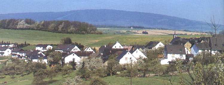 Ortsansicht von Schneppenbach, selbst fotografiert, gemeinfrei